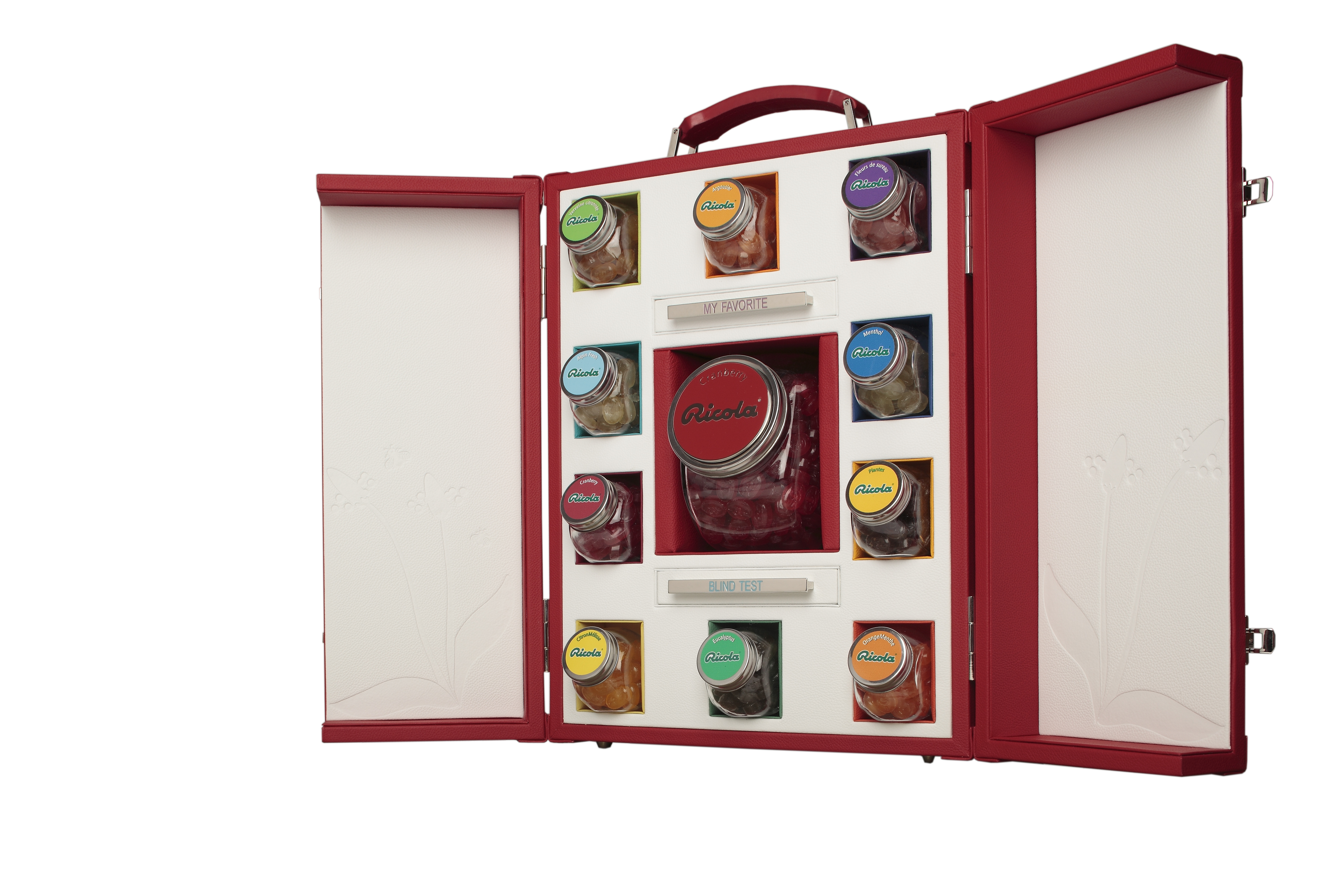 Malle Ricola créée par la maison de luxe Pinel & Pinel